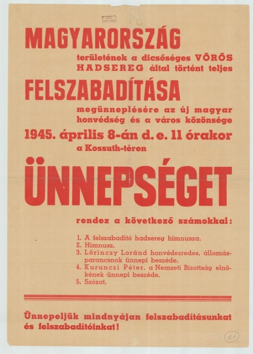 Plakát Magyarország felszabadításának ünnepségére 1945. április 8-án